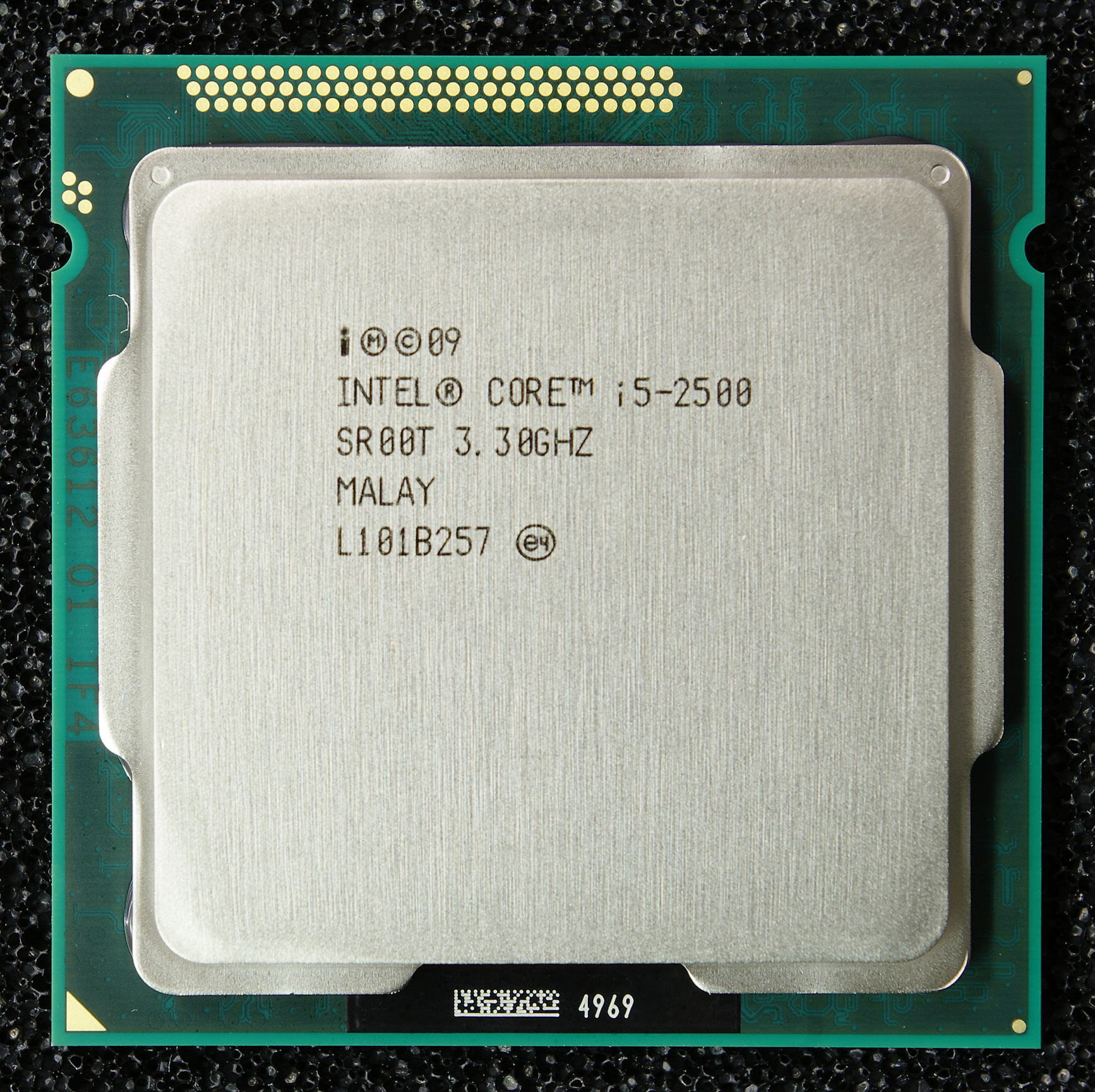 Intel core i5-2500 Socket 1155